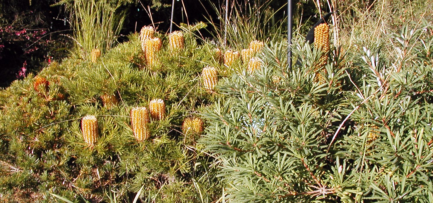 Banksia 'Birthday Candles' (L) & Banksia 'Stumpy Gold' (R), display garden, Kuranga Nursery